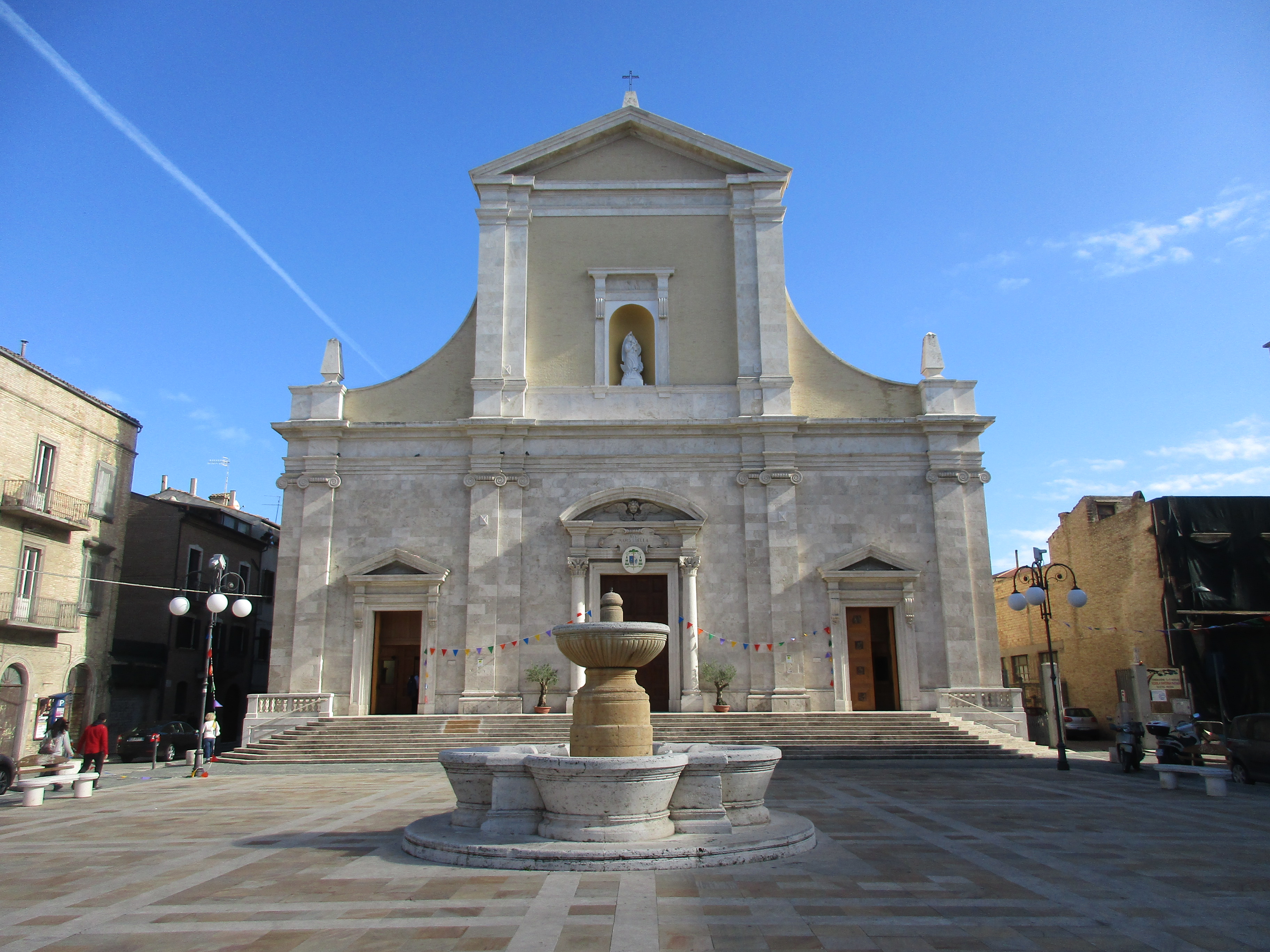 San Benedetto del Tronto - Chiesa Cattedrale, Madonna della Marina, dopo il restauro seguito al terremoto del 2016, e fontana in Piazza Nardone